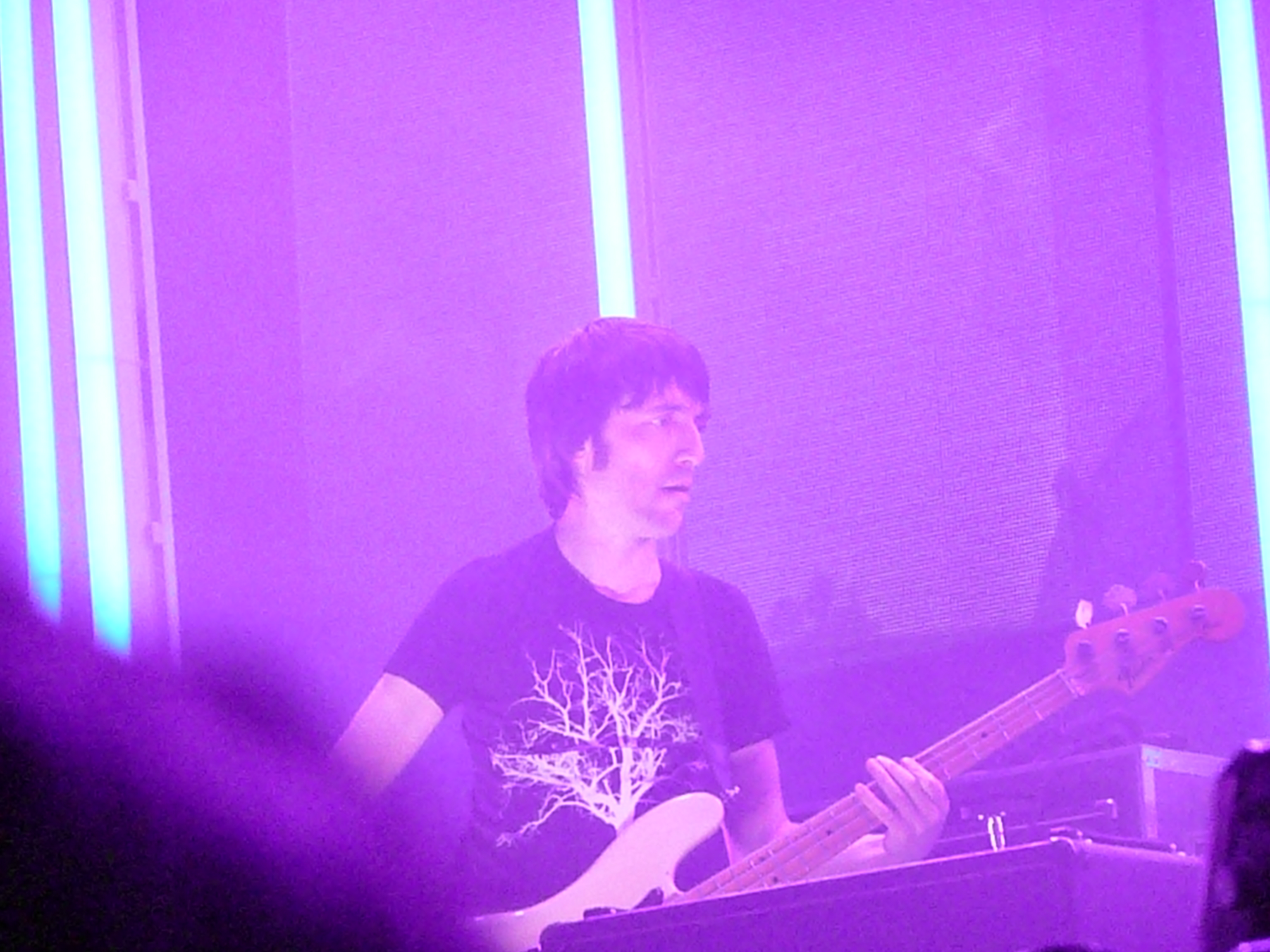 Colin Greenwood con Radiohead en Bristow, Virginia (EE.UU.) el 11 de mayo de 2008.